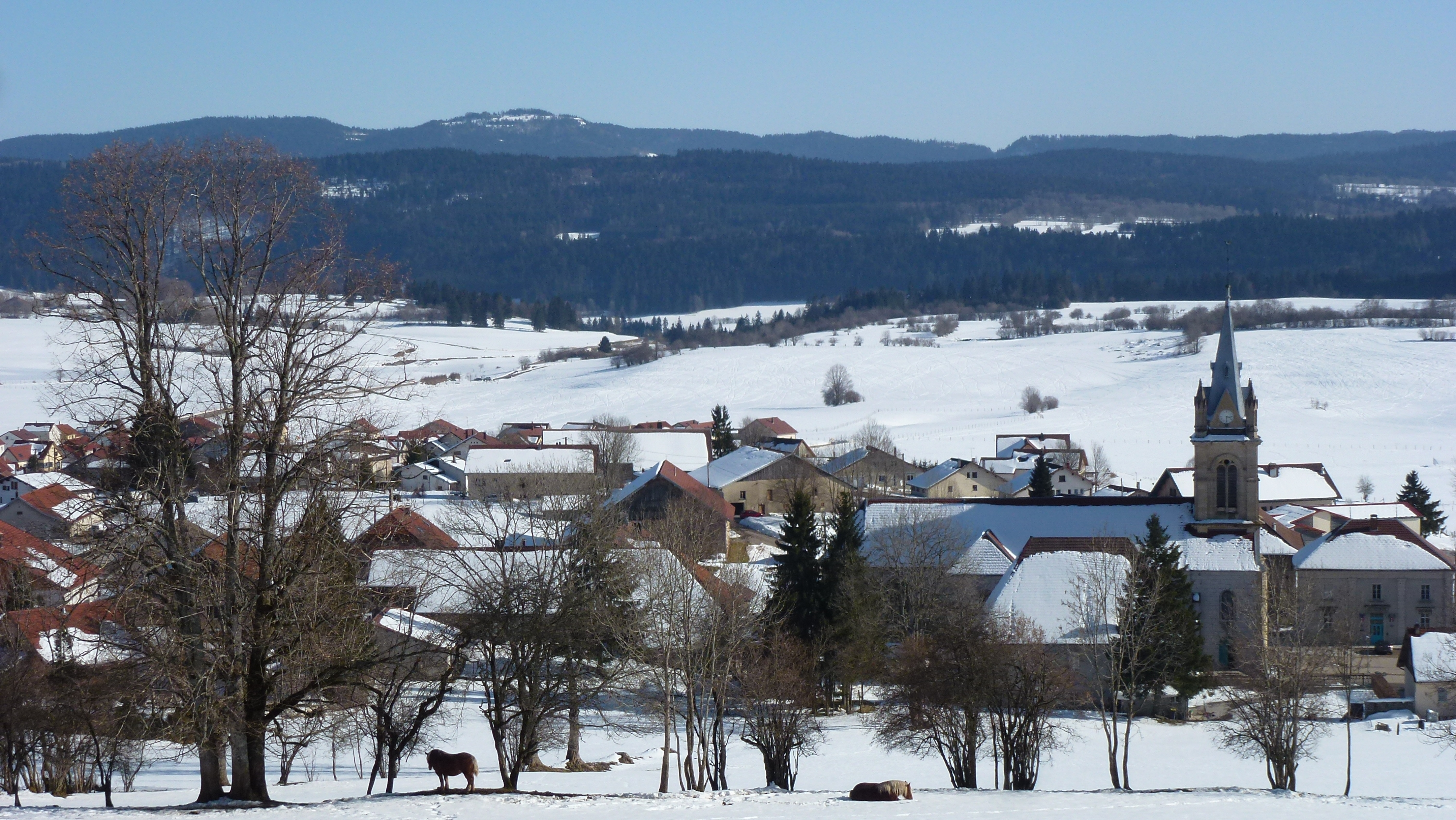 Paysage hivernal à Gilley. Chevaux comtois et église Sainte-Anne.